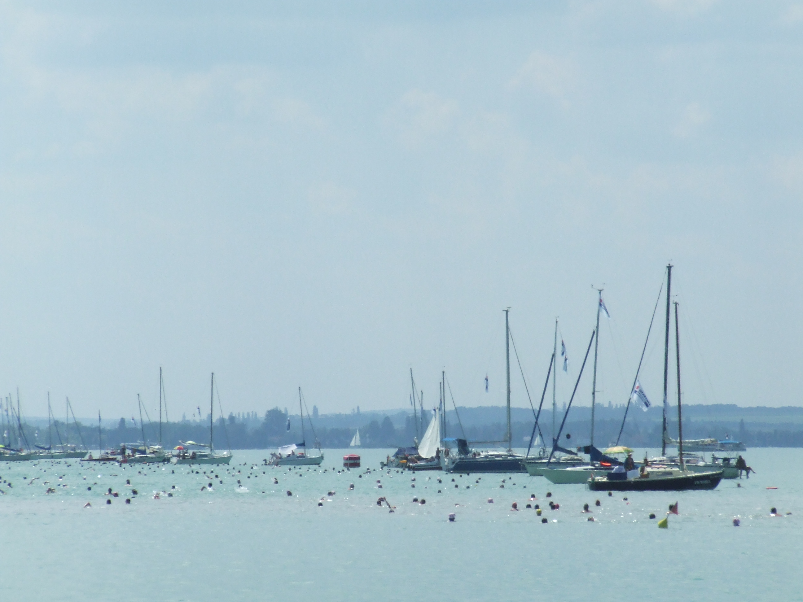 Balaton-átúszás 2016, Révfülöp